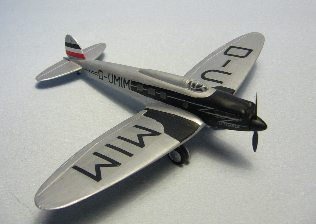 matchbox 1/72 scale model kit